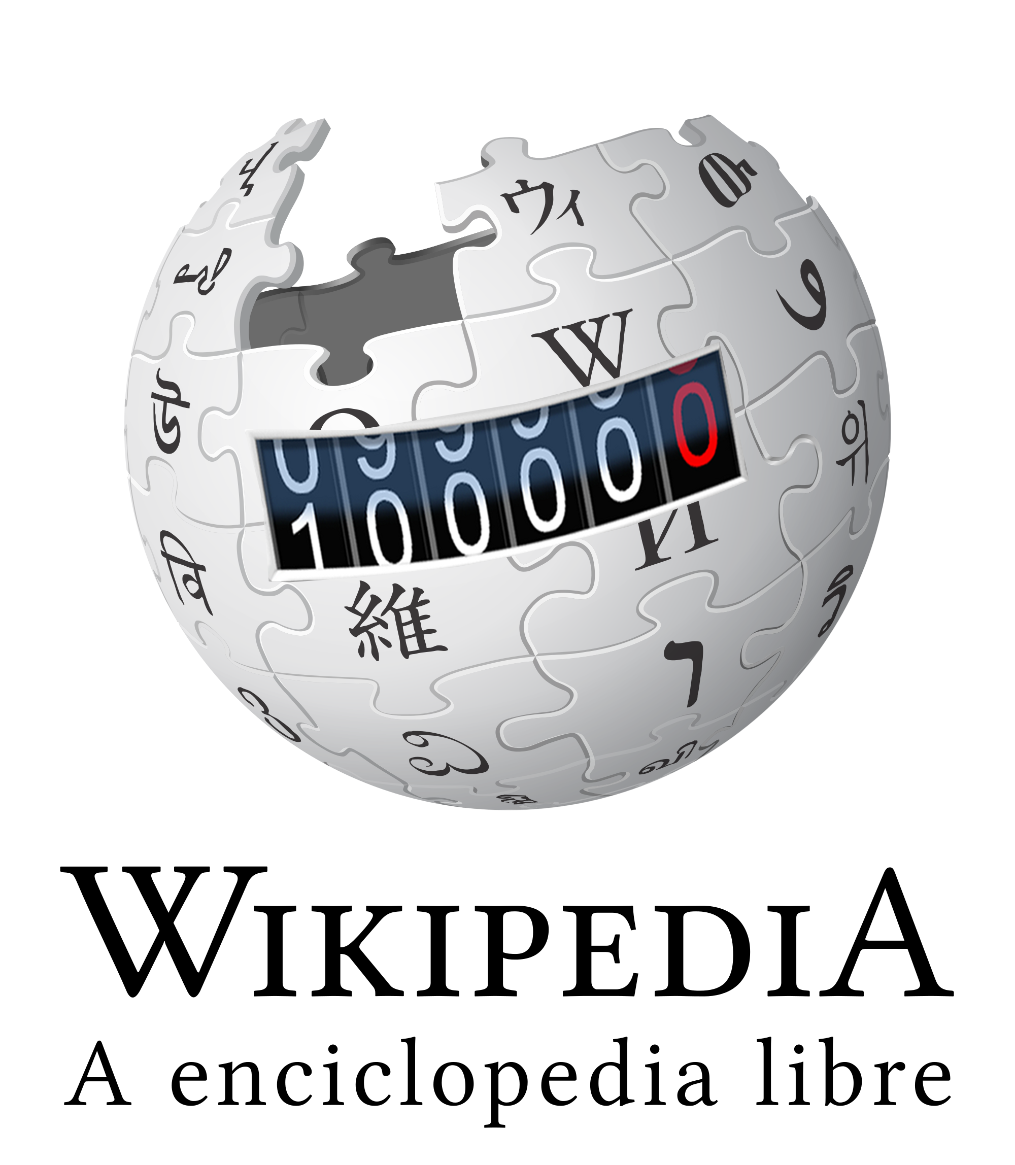 Logo da Galipedia para celebrar os 100.000 artigos.